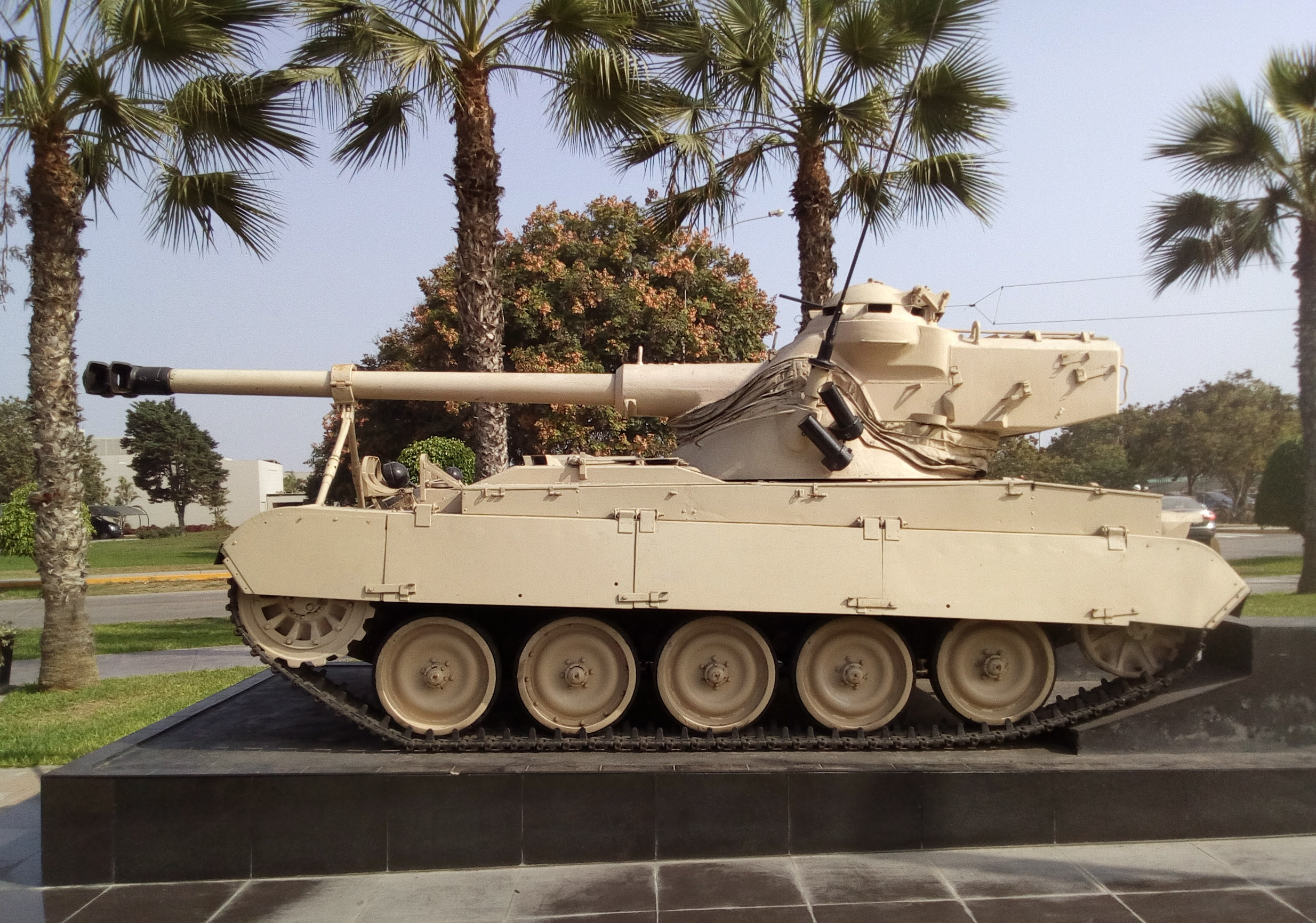 AMX-13 peruano en el Pentagonito